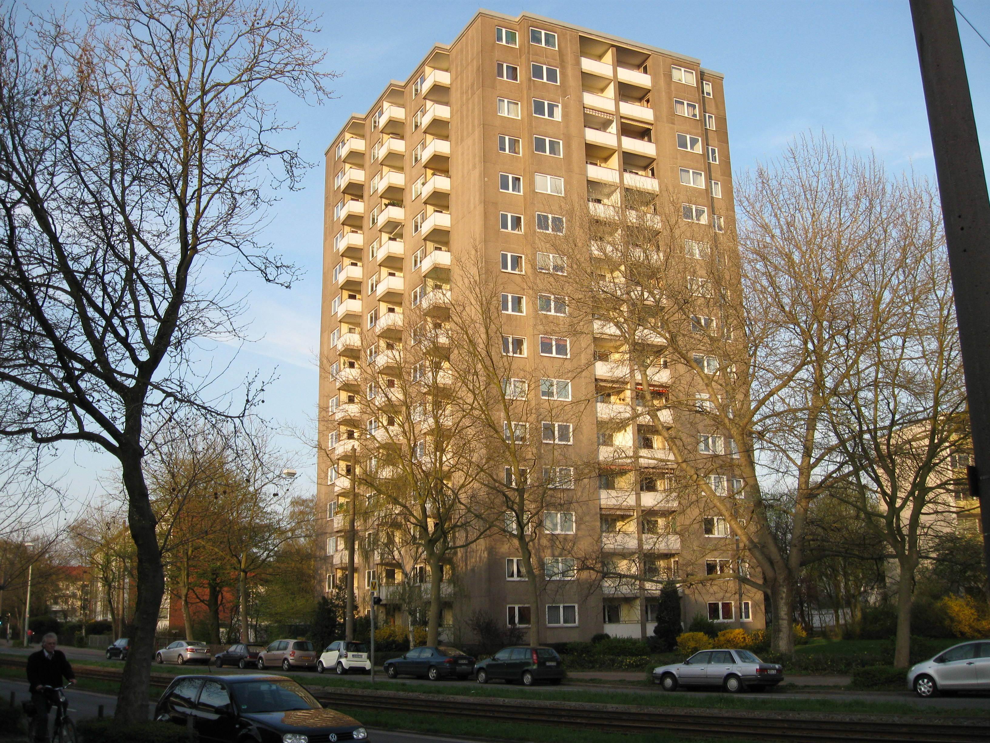 1964 nach den Plänen der Architekten Morschel, Henke und Hodde erbautes, 15-stöckiges Hochhaus in der H.-H.-Meier-Allee im Stadtteil Schwachhausen von Bremen. Es handelt sich dabei um das einzige Hochhaus dieses Stadtteils, der als erkennbarer Mittelpunkt des Ortsteils Neu-Schwachhausen dienen sollte, zunächst aber auch auf erhebliche Widerstände stieß. Siehe Architekturführer Bremen